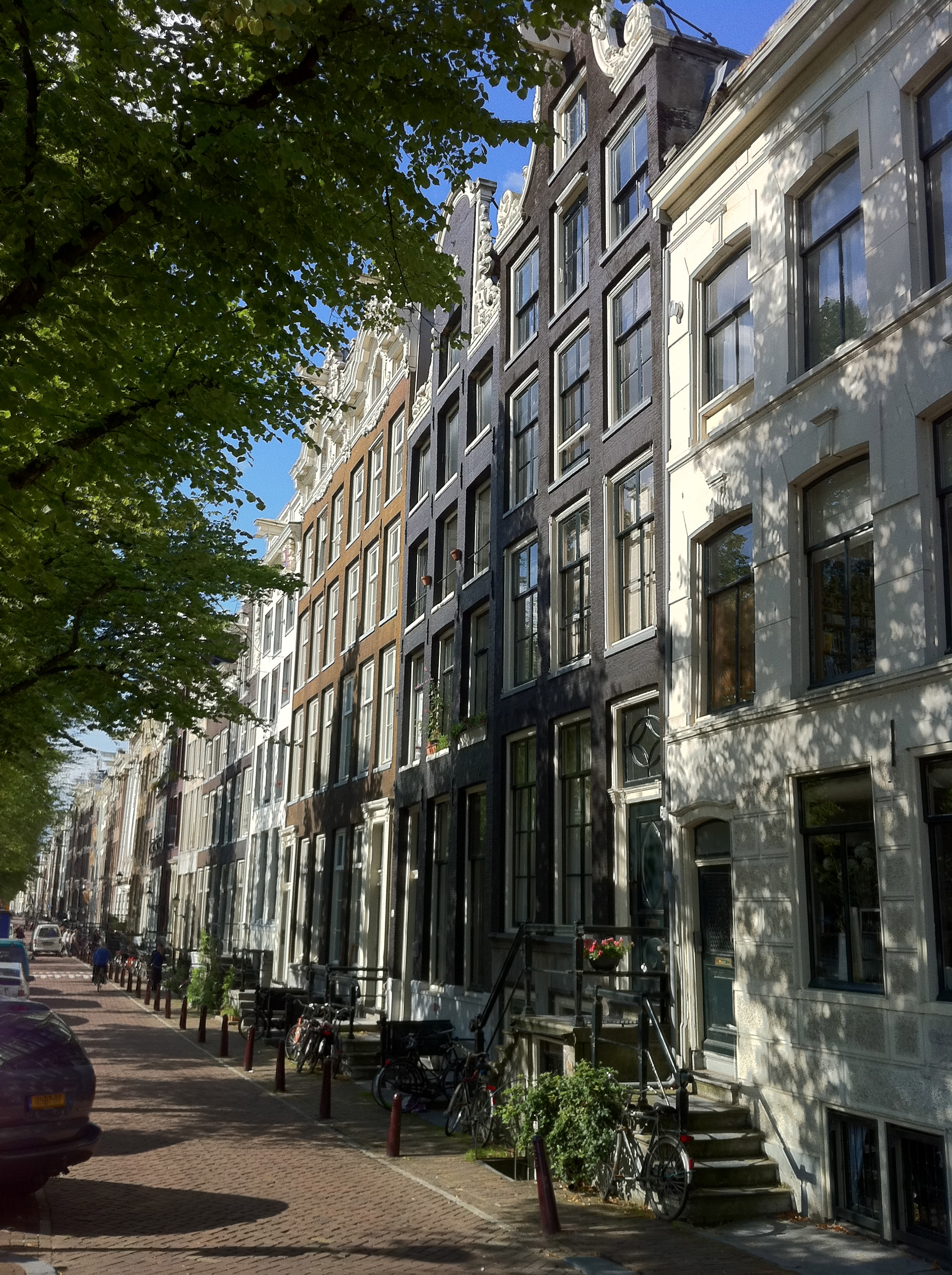 Groote Keijser, Keizersgracht v.r.n.l. 242-252 Amsterdam Netherlands in juli 2011, voormalig bolwerk kraakbeweging, nu verhuurd als sociale woningbouw door Ymere